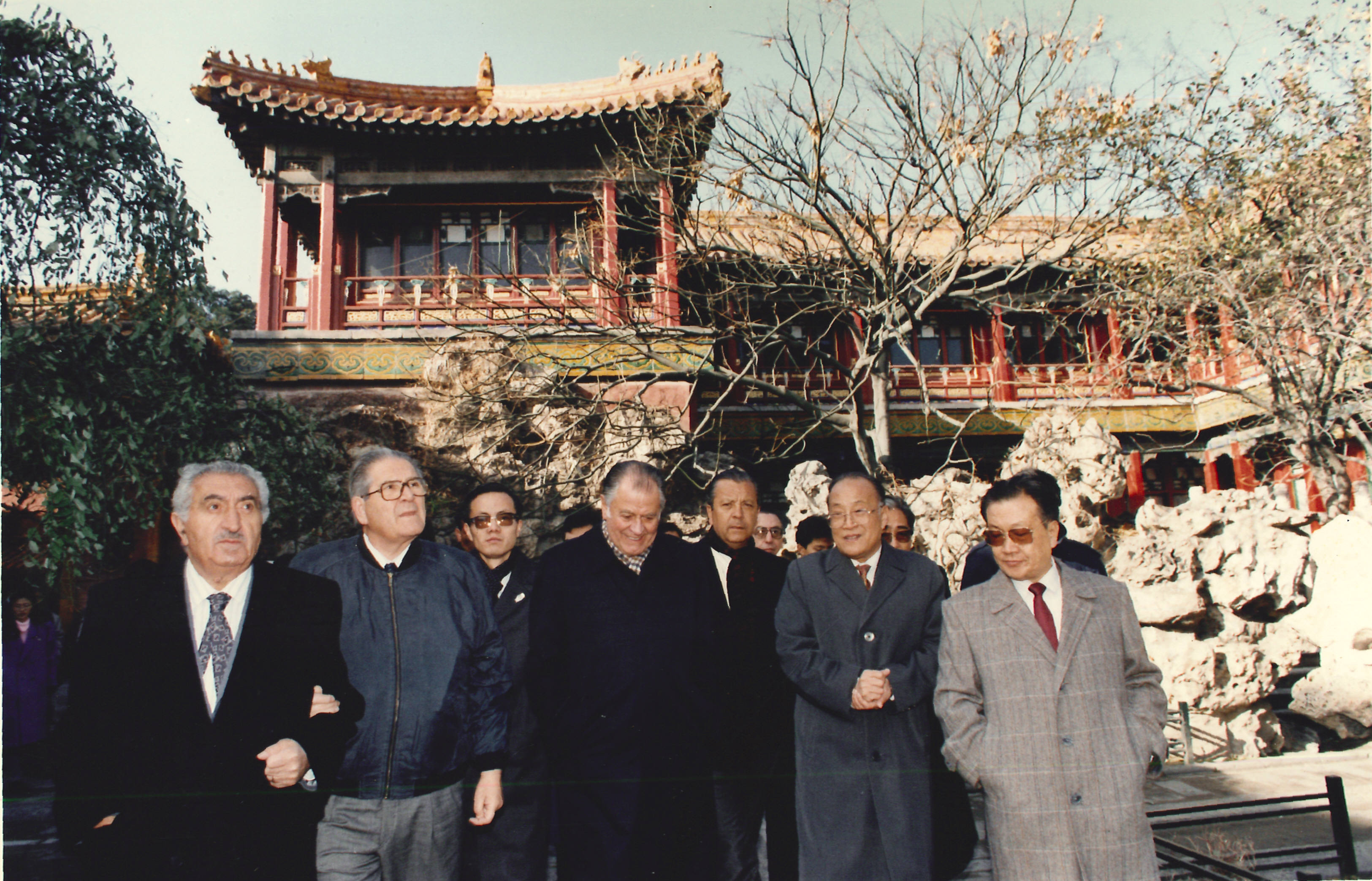 En visita oficial a la República Popular China el Presidente Patricio Aylwin junto al ministro de Minería Alejandro Hales, el ministro de Relaciones Exteriores Enrique Silva Cima y el senador Sergio Romero. Noviembre 1992